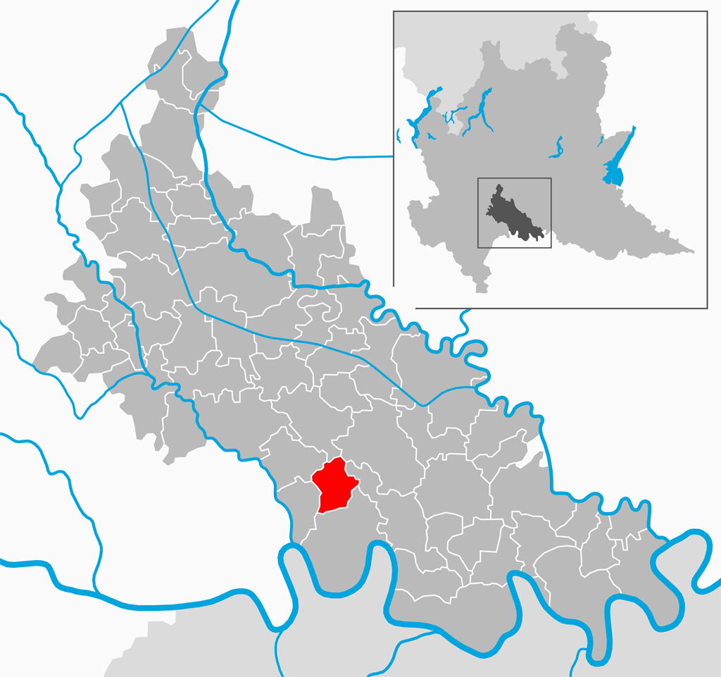 Il comune di Ospedaletto Lodigiano nella provincia di Lodi